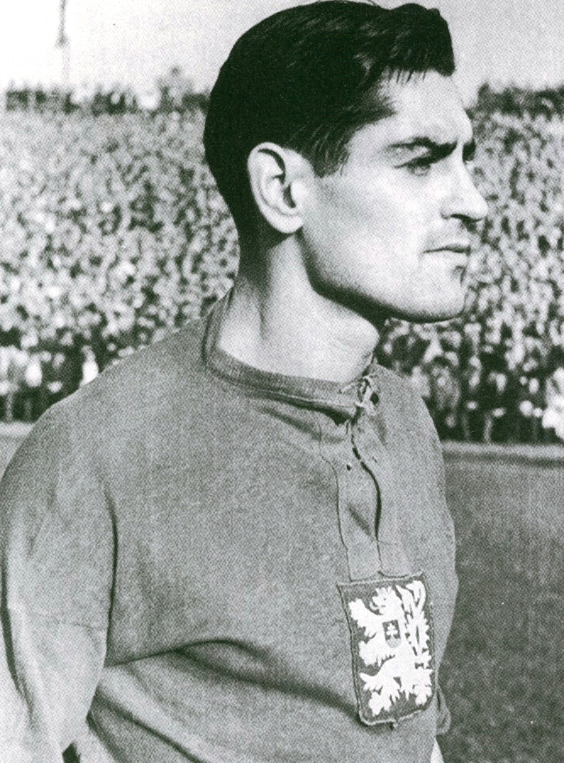 fotografia